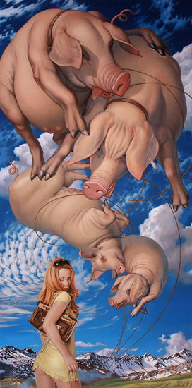 Fliegende Schweine vor Himmel